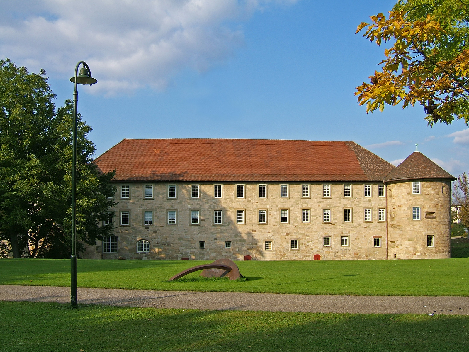 Burgschloss Schorndorf, Deutschland, davor die Skulptur "Eigener Schatten" von Reinhard Scherer